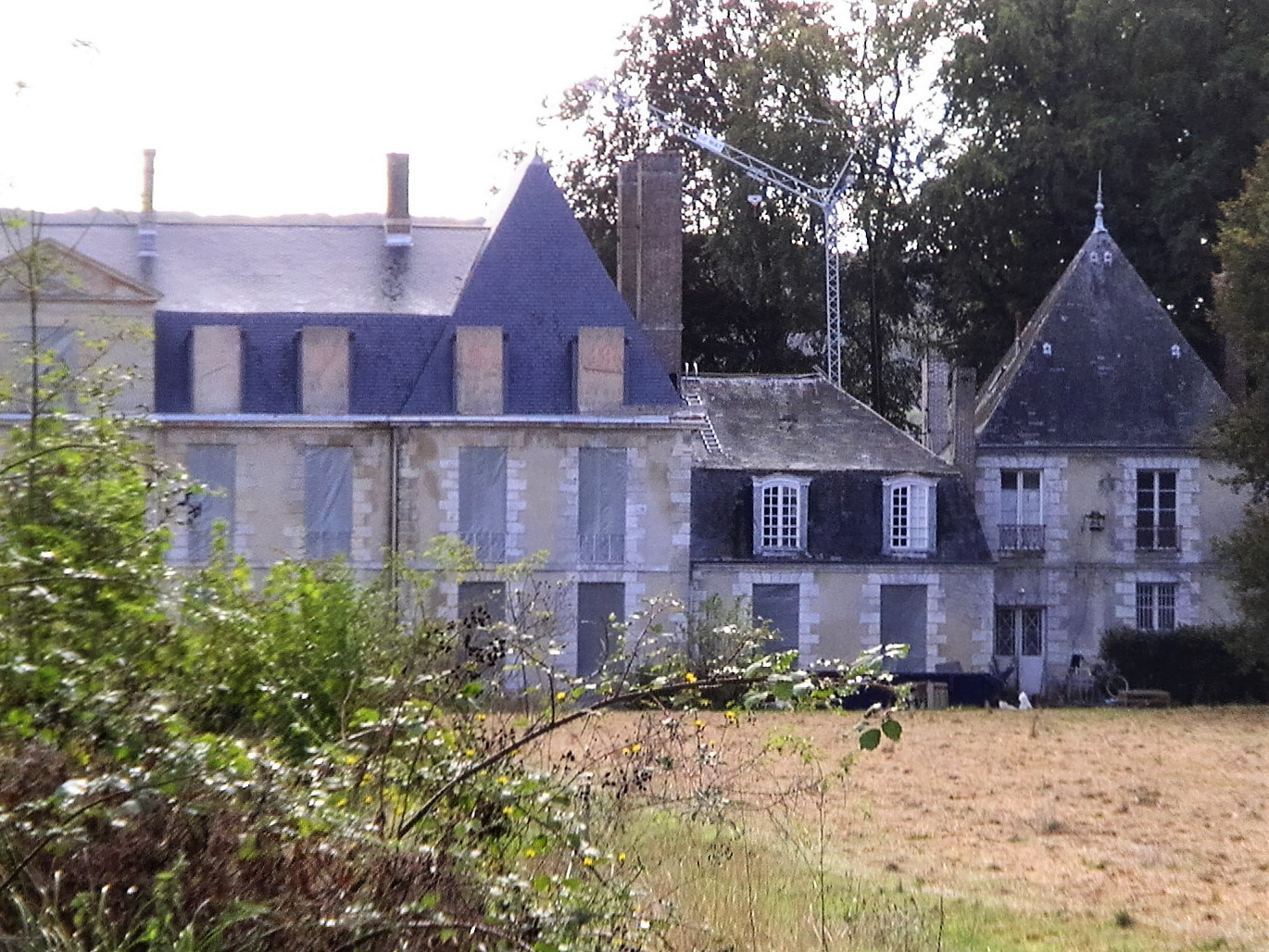 Tosny (Eure) - Le château, côté bois - façade droite - vue approchée.